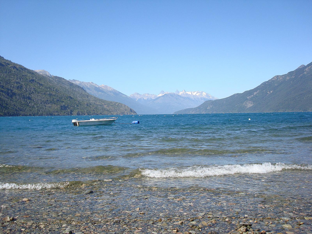 Lago Puelo, provincia del Chubut, Argentina